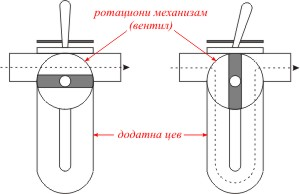 схема вентила на хорнама